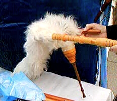 Romanian Bagpipe